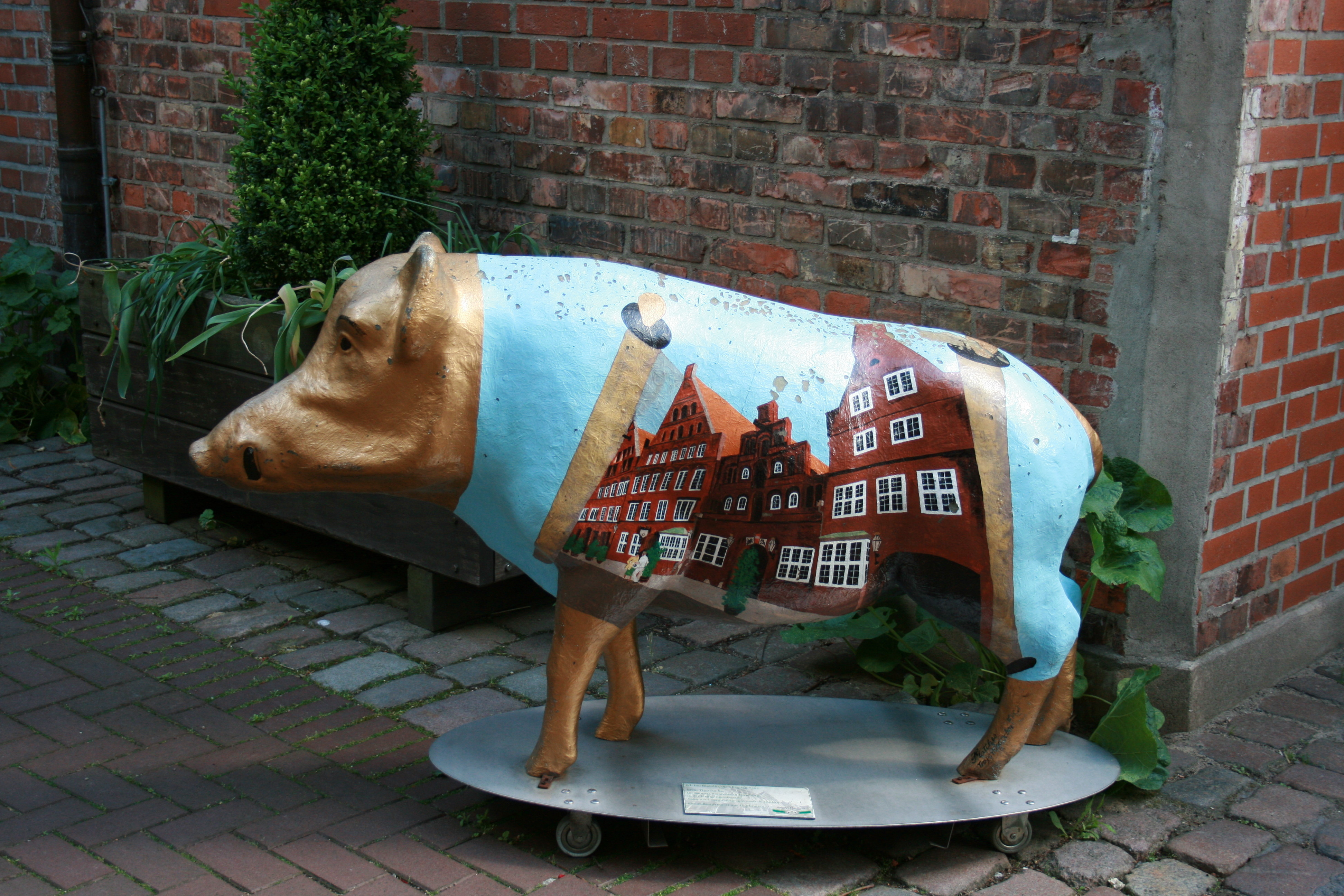 Gasthaus Krone, Heiligengeiststraße in Lüneburg